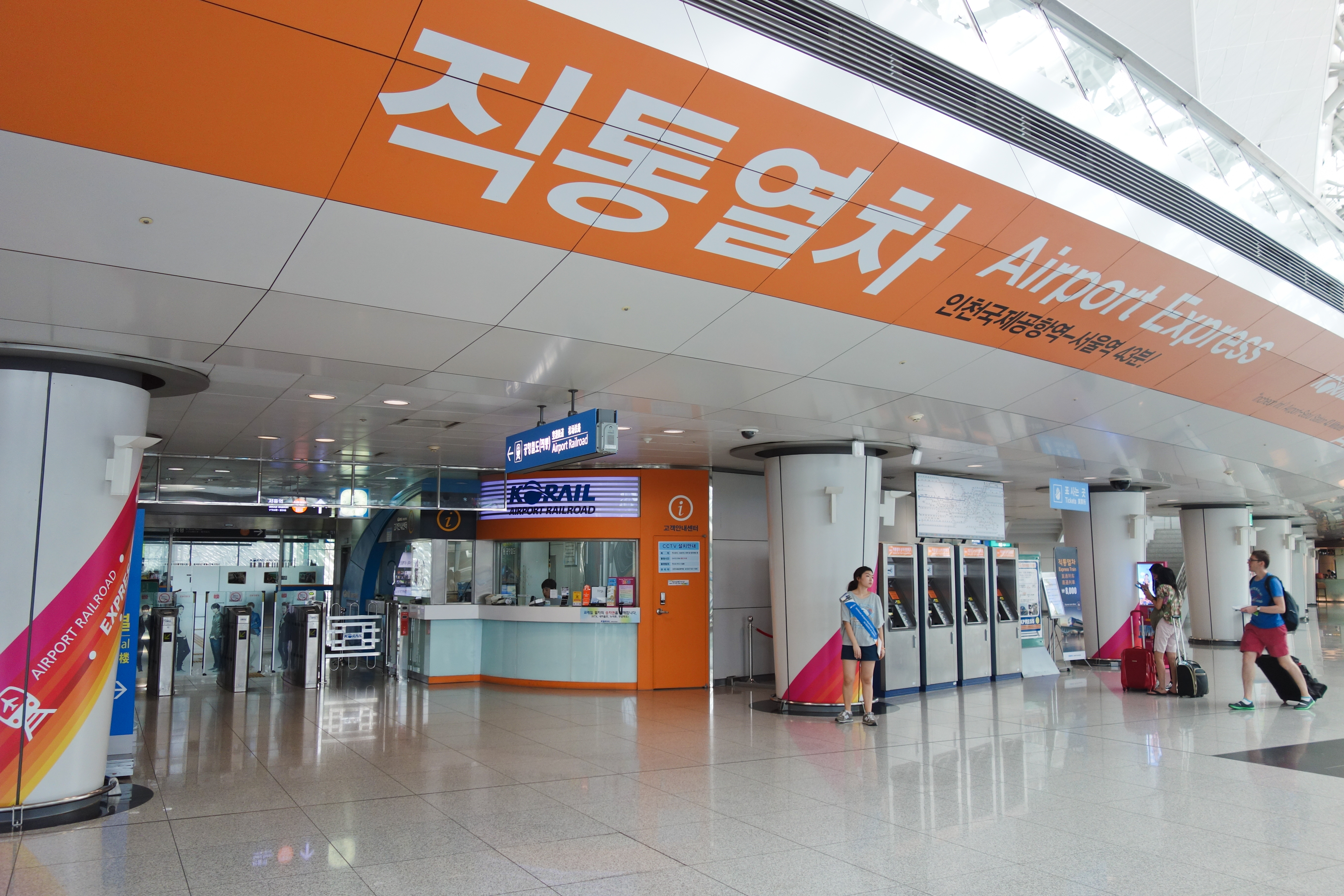 KORAIL空港鉄道 仁川国際空港駅（直通列車用改札、2013年7月）